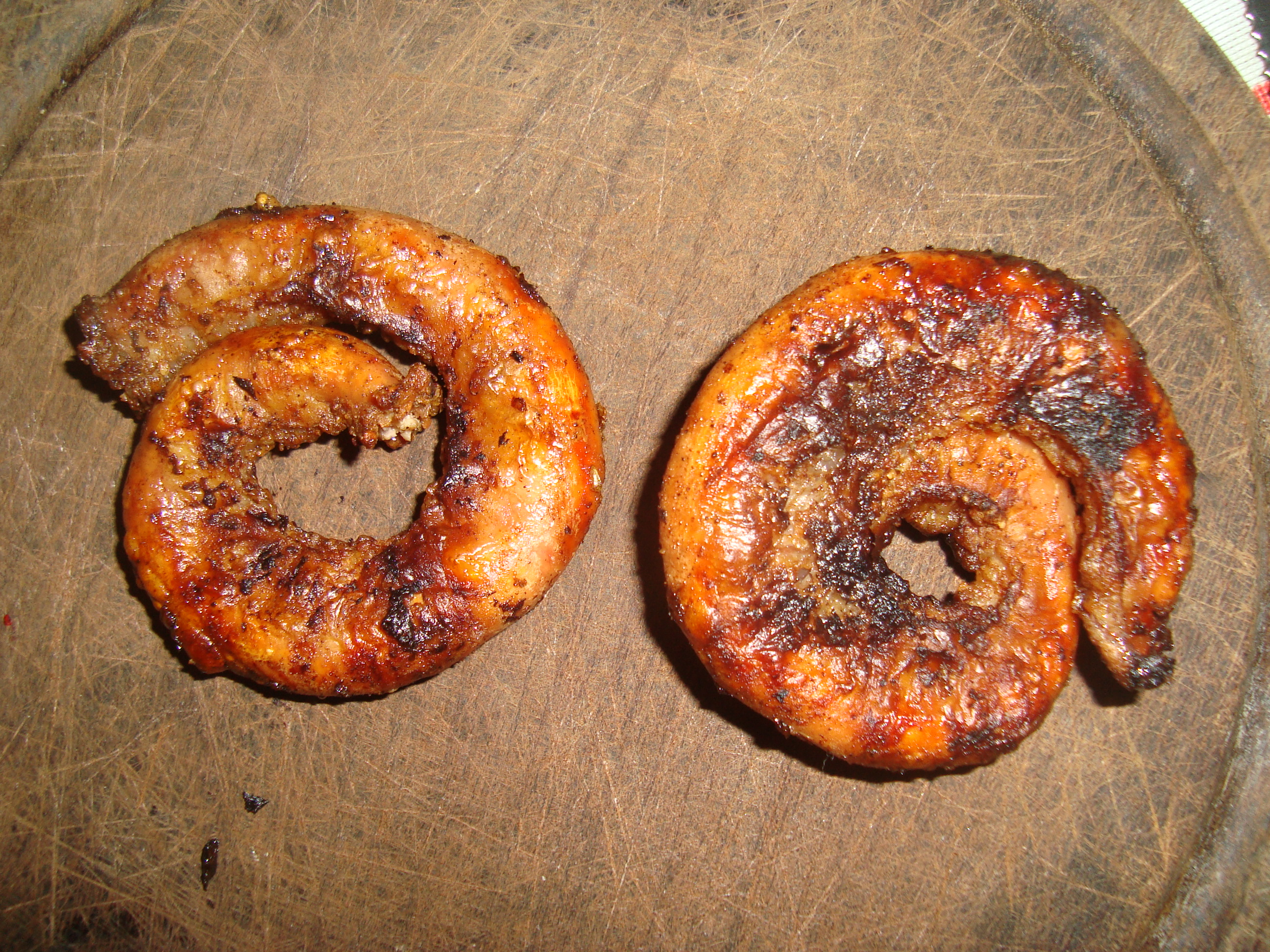 Chinchulines hechos en la parrilla, servidos para comer en plato de madera.